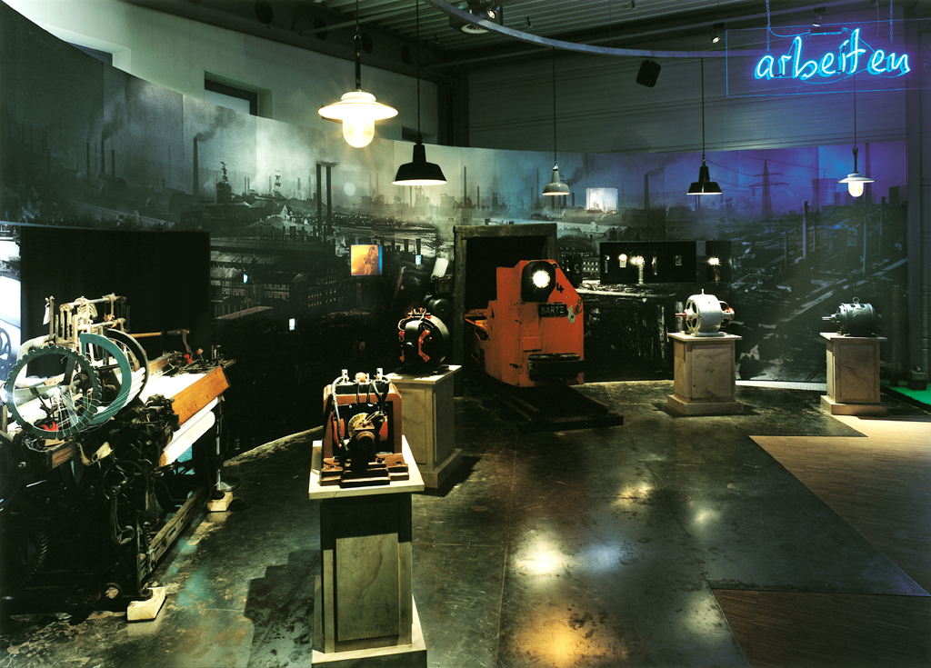 Ausstellungsbereich im Museum "Strom und Leben" des Umspannwerkes Recklinghausen